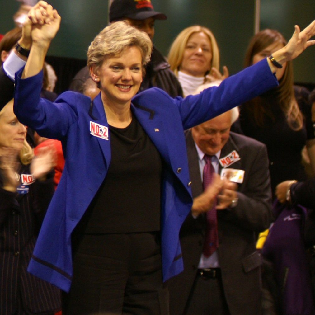 Jennifer Granholm